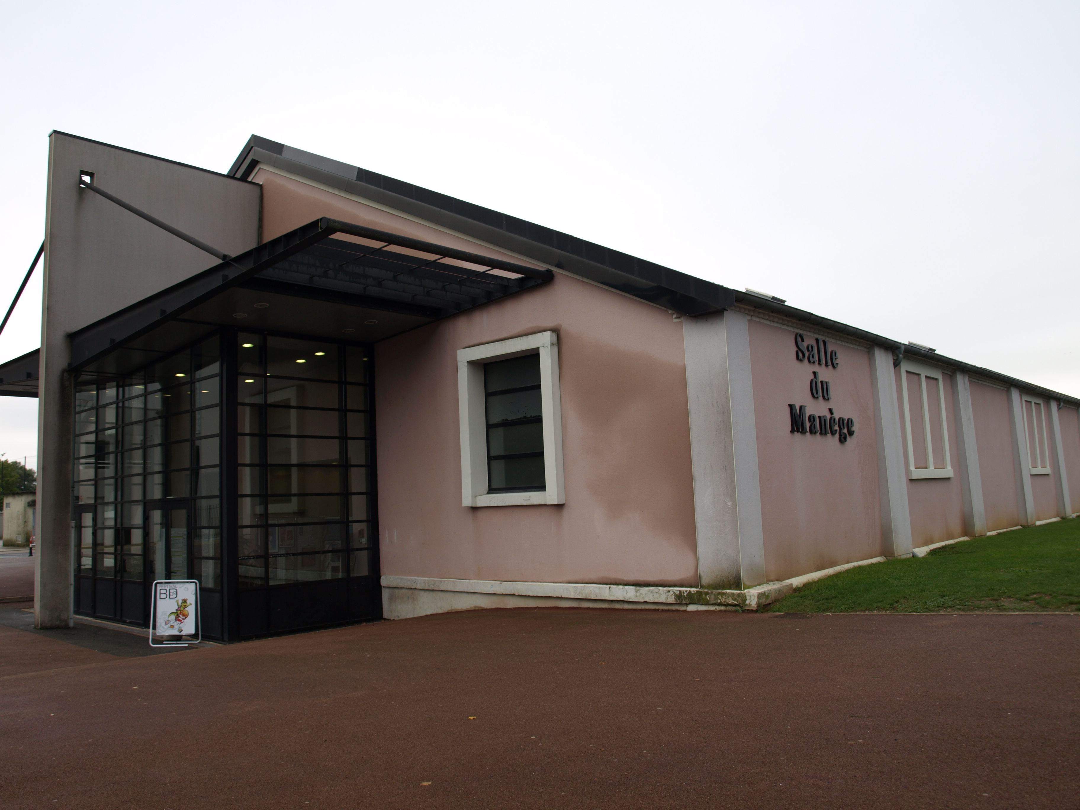 Salle du Manège (salle des fêtes de Vitry-le-François) où s'est déroulé le festival de Bande dessinée "Bulles en champagne".